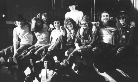 Gruppe Elefant 1976.Erster Auftritt in der Weimarhalle.